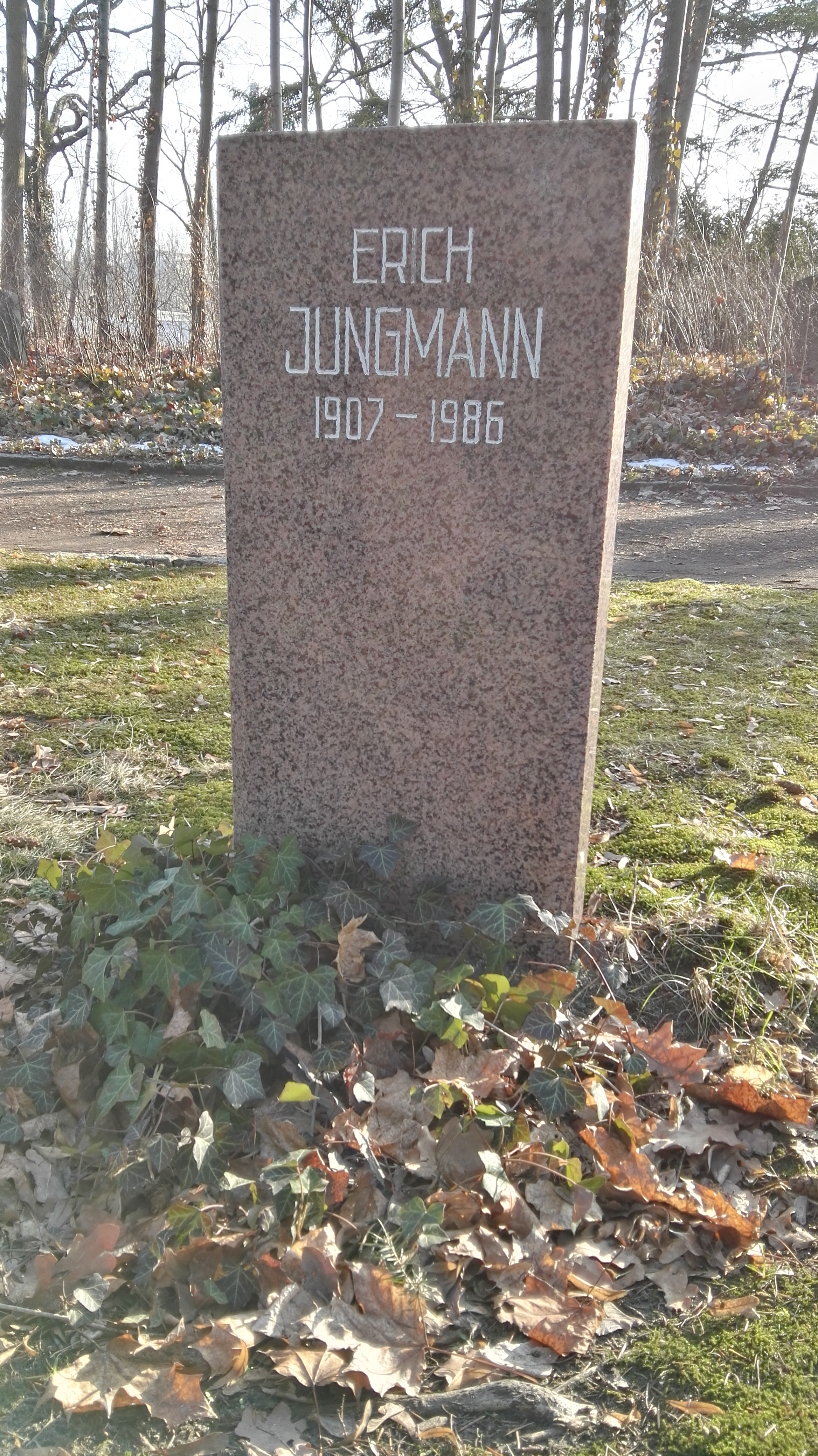 Grab von Erich Jungmann in der Grabanlage Pergolenweg auf dem Sozialistenfriedhof des Zentralfriedhofs Friedrichsfelde